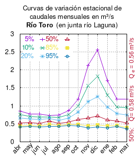 Curva de variación estacional del río Toro antes de junta con río Laguna. # cita publicación # | apellido = Dirección General de Aguas # | nombre = # | enlace-autor = Ministerio de Obras Públicas (Chile) # | título = Diagnóstico y clasificación de los cursos y cuerpos de agua según objetivos de calidad. Cuenca del río Elqui. # | ubicación = Santiago de Chile # | editorial = Ministerio de Obras Públicas (Chile) # | año = 2004 # | edición = # | url = # | urlarchivo = # | fechaarchivo = 20070927201320 # | ref = harv # Tabla 4.2 (m3/s) pág. 43 mes 5% 10% 20% 50% 85% 95% abr 0.863 0.758 0.659 0.532 0.445 0.415 may 0.773 0.705 0.636 0.538 0.461 0.431 jun 0.779 0.696 0.616 0.513 0.441 0.416 jul 0.73 0.696 0.655 0.576 0.479 0.422 ago 0.747 0.671 0.601 0.513 0.455 0.435 sep 0.869 0.764 0.669 0.553 0.480 0.456 oct 1.186 0.997 0.825 0.617 0.486 0.444 nov 2.131 1.569 1.118 0.663 0.446 0.394 dic 2.554 1.825 1.259 0.713 0.472 0.417 ene 1.698 1.295 0.963 0.613 0.436 0.391 feb 1.184 0.972 0.787 0.577 0.457 0.422 mar 1.195 0.956 0.752 0.525 0.400 0.365 This plot was created with Gnuplot.